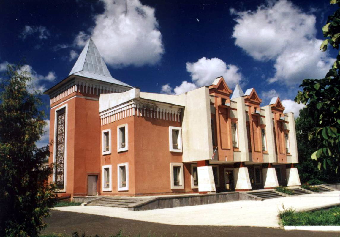 Балашов. Краеведческий музей.